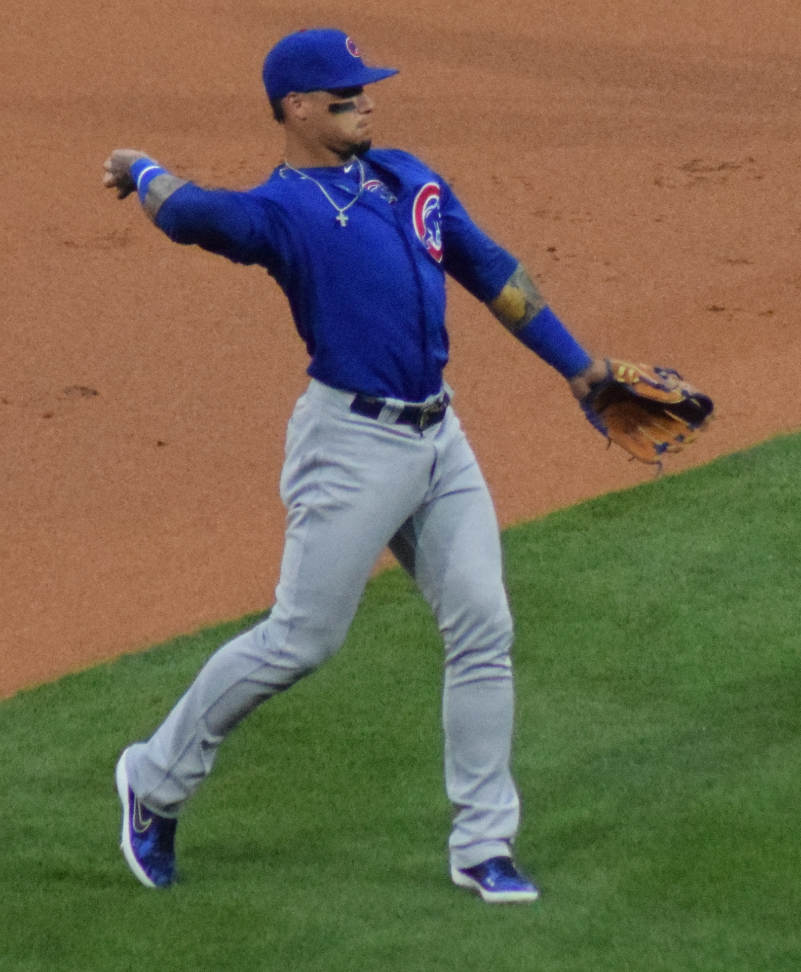 Javier Baez